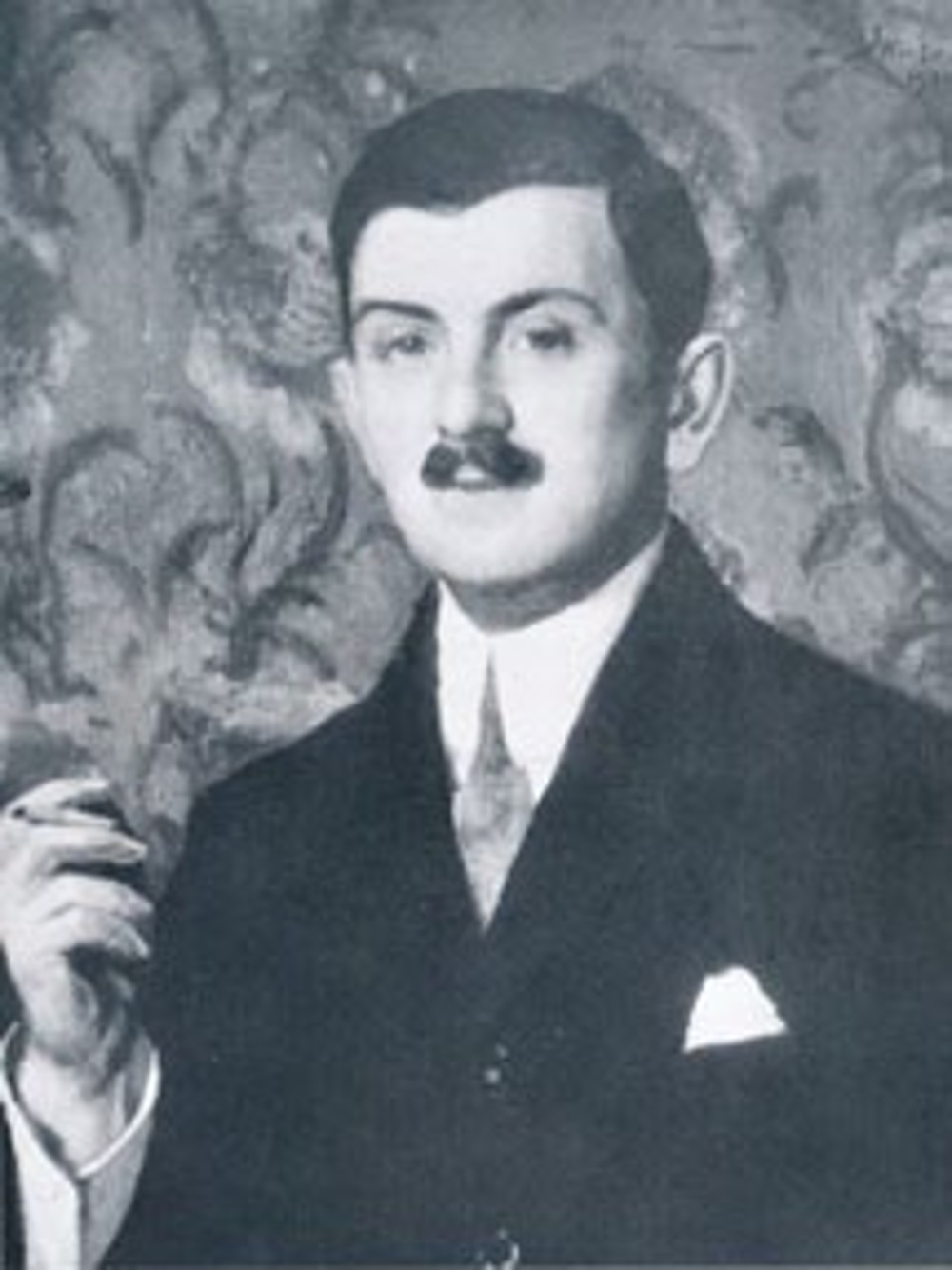 Alexander Skutecký, slovenský architekt